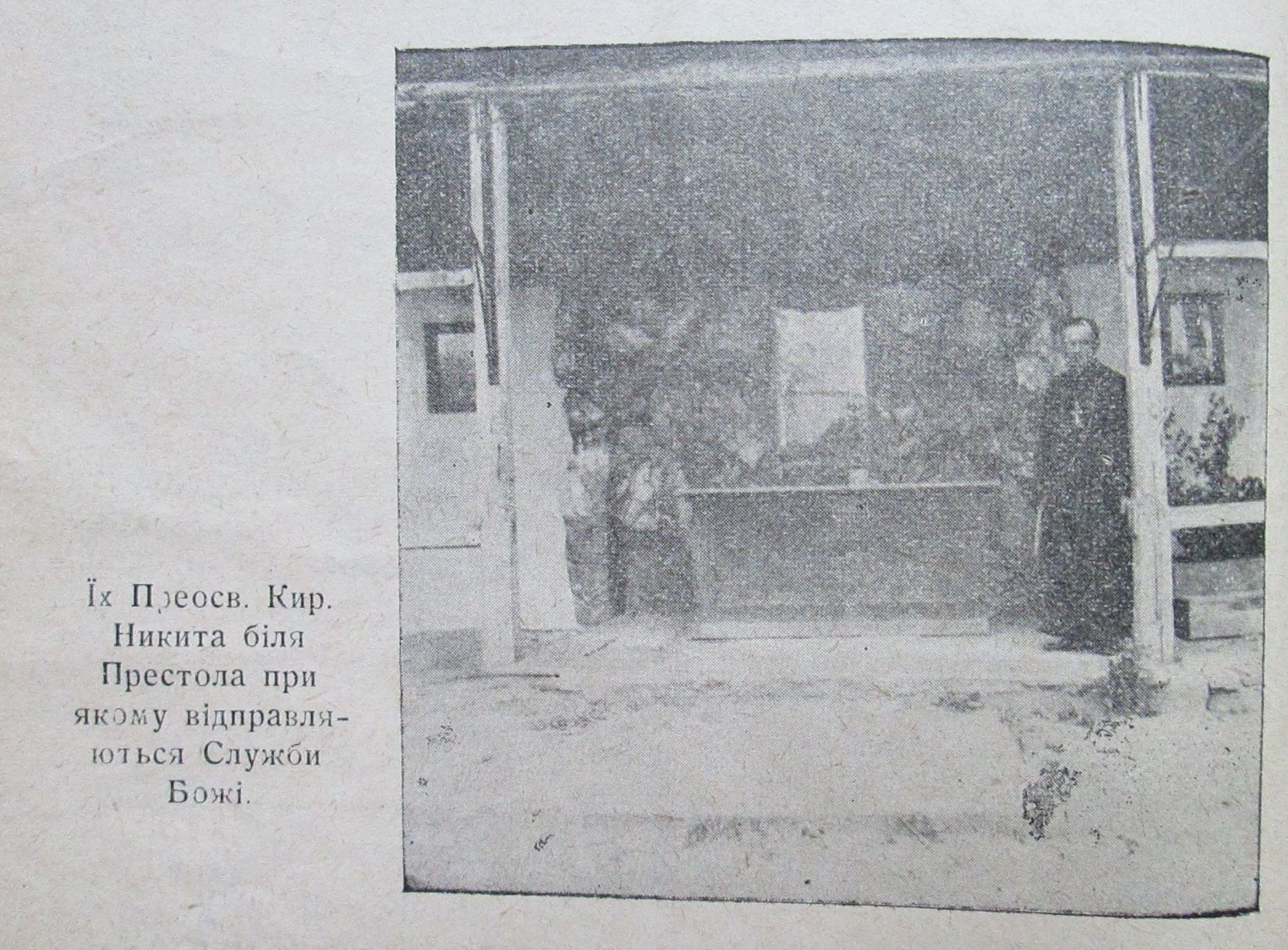 Никита Будка біля щойно збудованого престолу у Зарваниці. 1934 рік